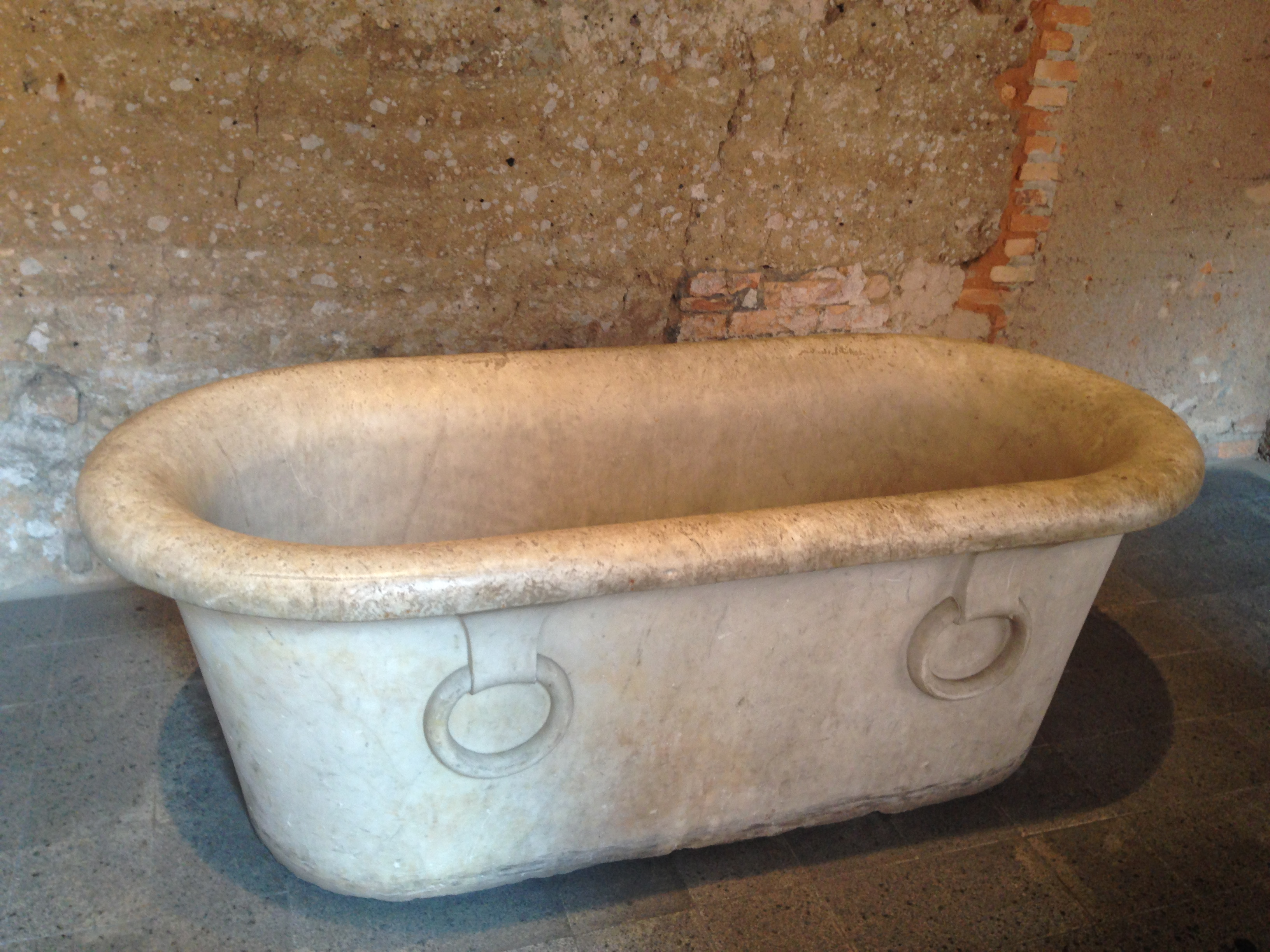 Banheira que era utilizada por Domitila de Castro Canto e Melo, a Marquesa de Santos